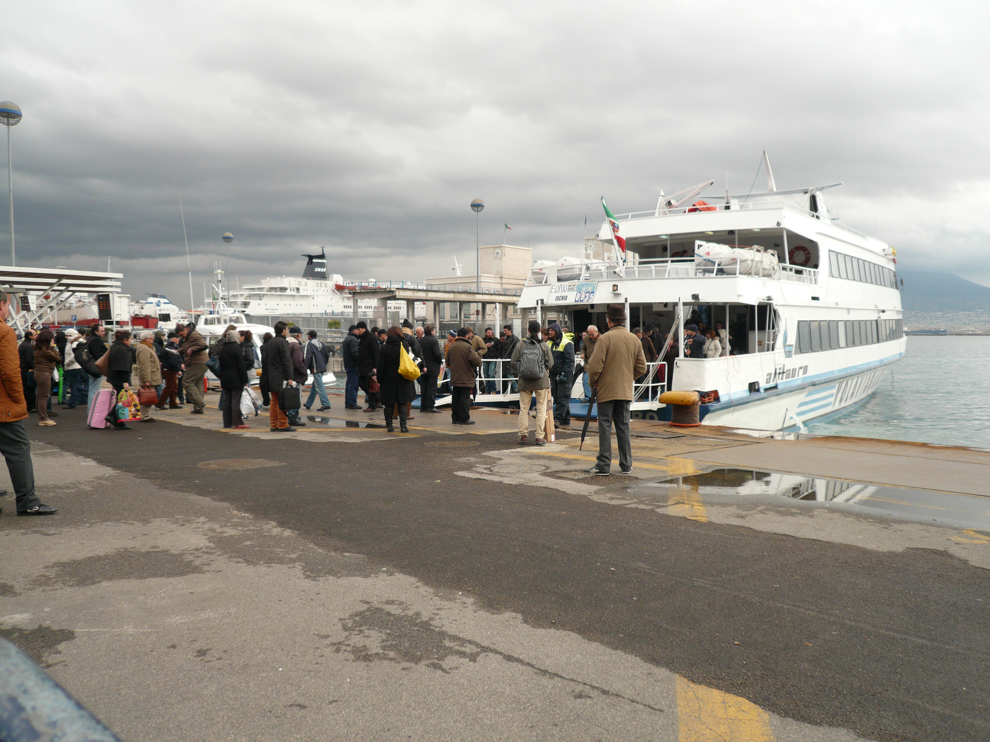 operazioni di sbarco (e successivo imbarco) da un aliscafo operante sulla tratta Napoli-isola d'Ischia